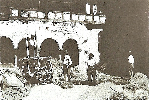 Abtei St.-André Lavaudieu, Kreuzganghof vor 1900, Landhandel